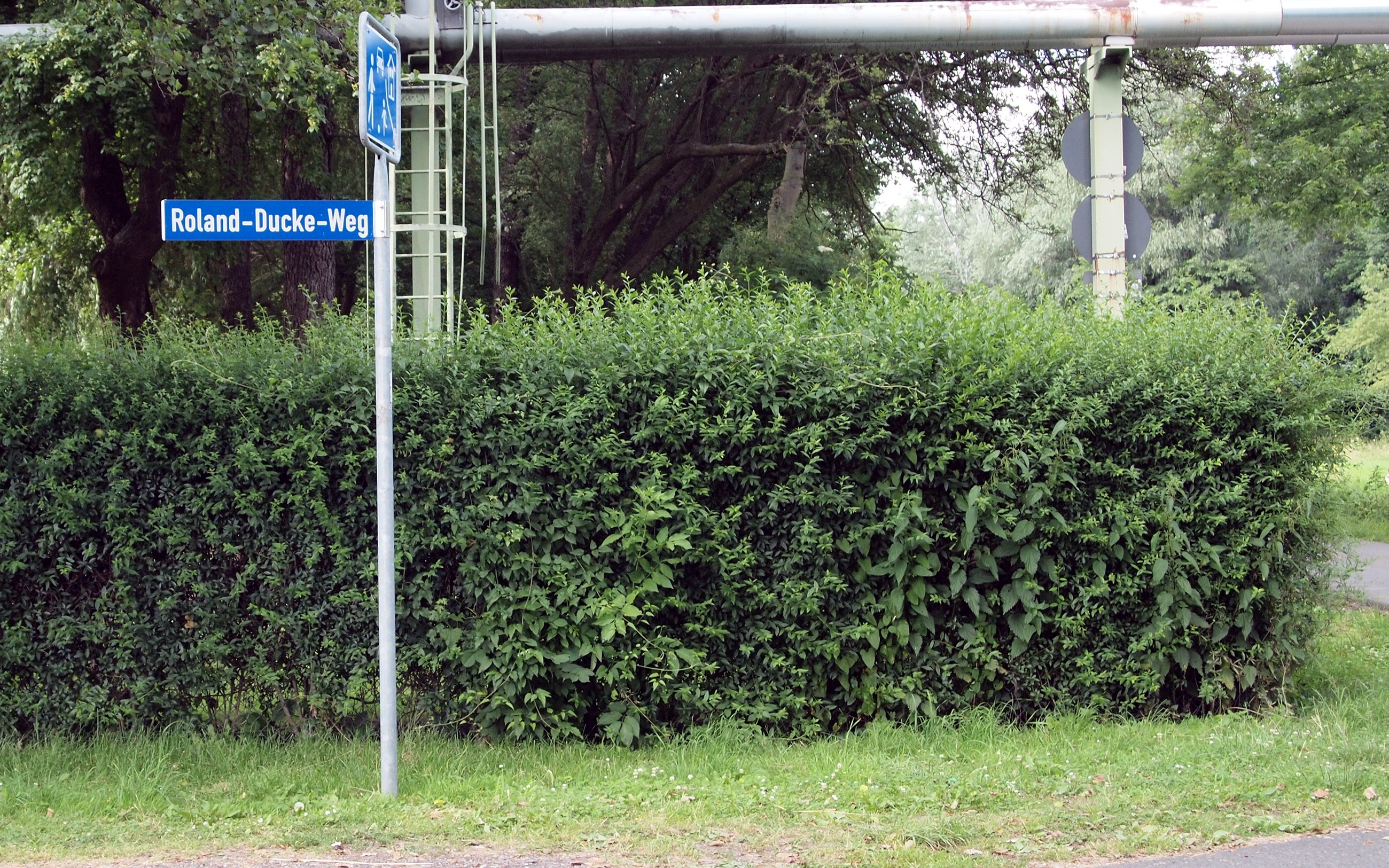 Roland-Ducke-Weg im Jenaer Volkspark Oberaue, 26. Juni 2016